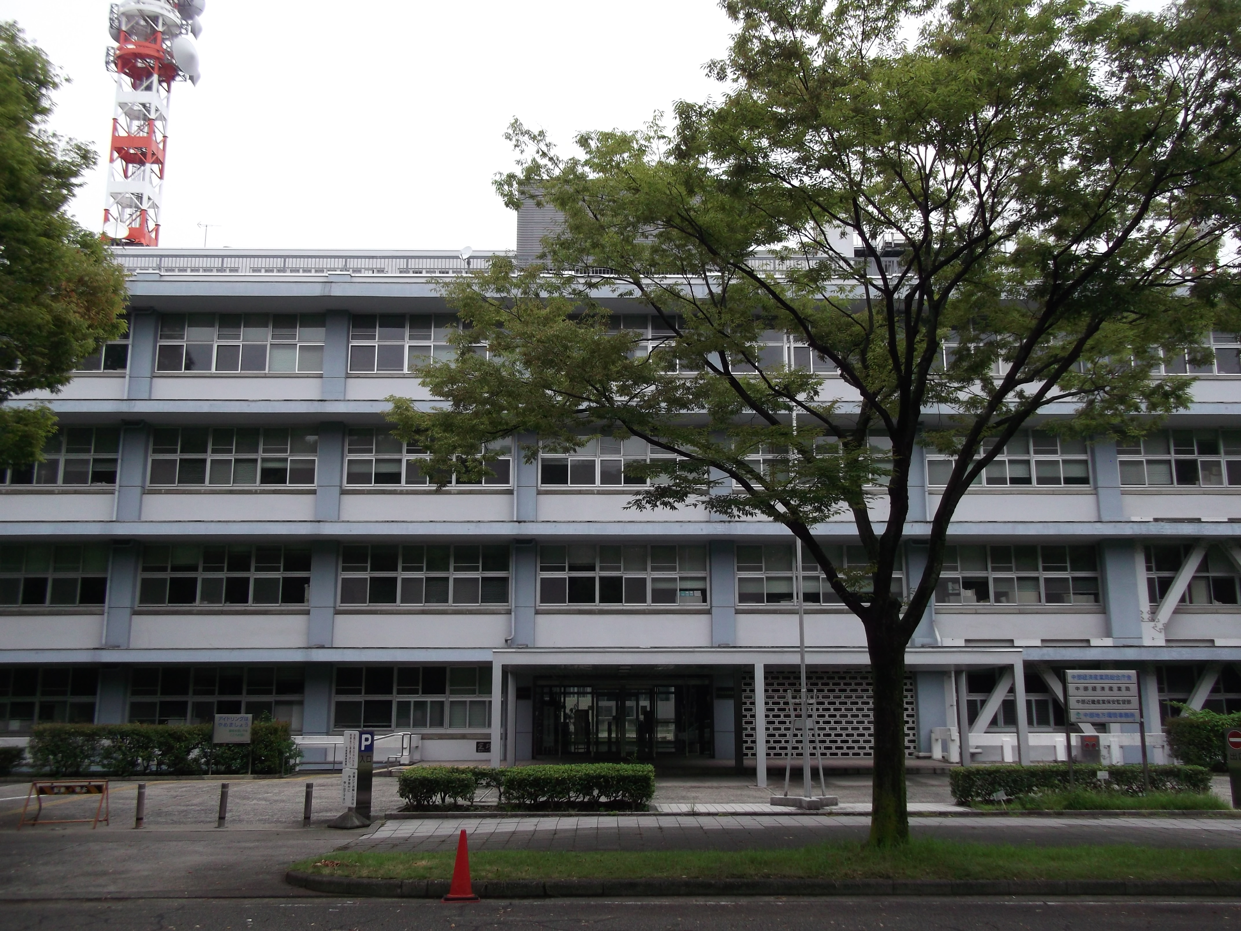 名古屋市中区の中部経済産業局総合庁舎を南側公道より撮影（中部経済産業局、中部近畿産業保安監督部、中部地方環境事務所）